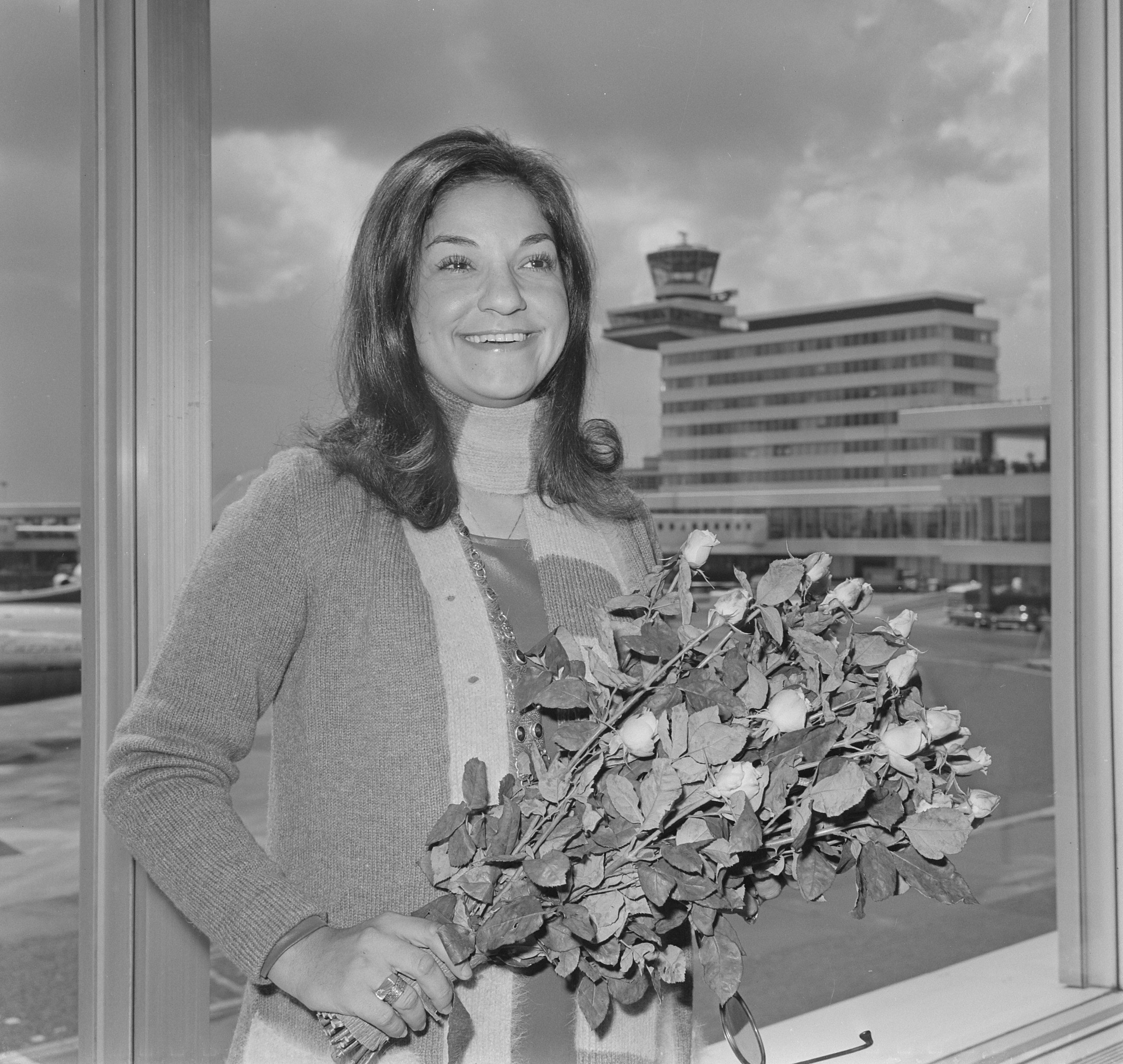 Collectie / Archief : Fotocollectie Anefo Reportage / Serie : [ onbekend ] Beschrijving : Franse zangeres, Frida Boccara , een van de winnaressen van het Eurovisie Songfestival, arriveert op Schilhol, kop Datum : 28 augustus 1969 Trefwoorden : zangeressen Persoonsnaam : Frida Boccara Fotograaf : Evers, Joost / Anefo Auteursrechthebbende : Nationaal Archief Materiaalsoort : Negatief (zwart/wit) Nummer archiefinventaris : bekijk toegang 2.24.01.03 Bestanddeelnummer : 922-7399